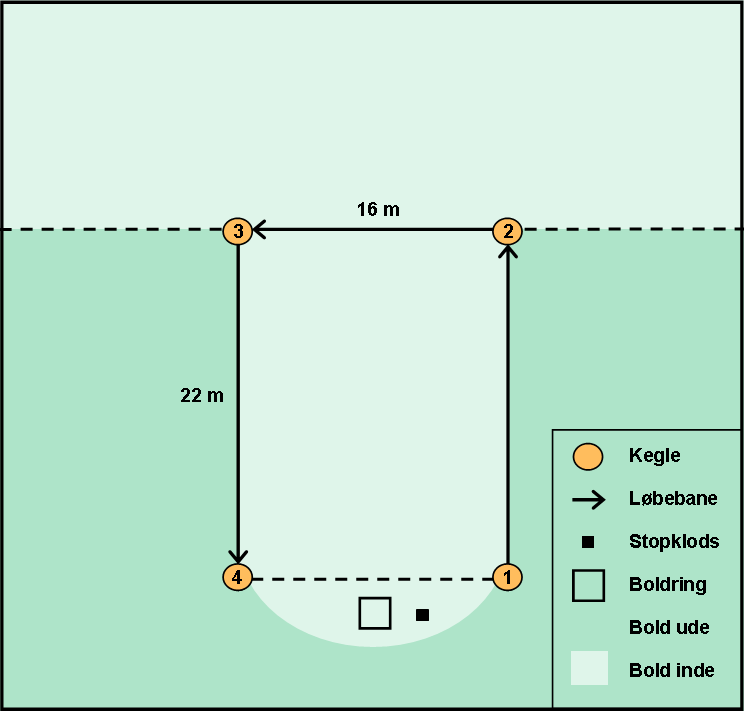 Rundboldbane